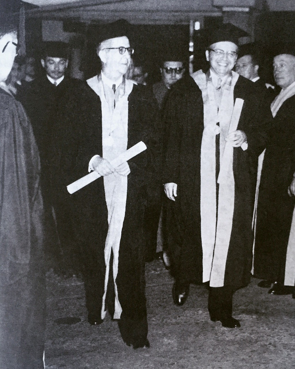 Los escritores Augusto Mijares y Mariano Picón Salas en el acto de imposición del Doctorado Honoris Causa por parte de la Universidad Central de Venezuela.